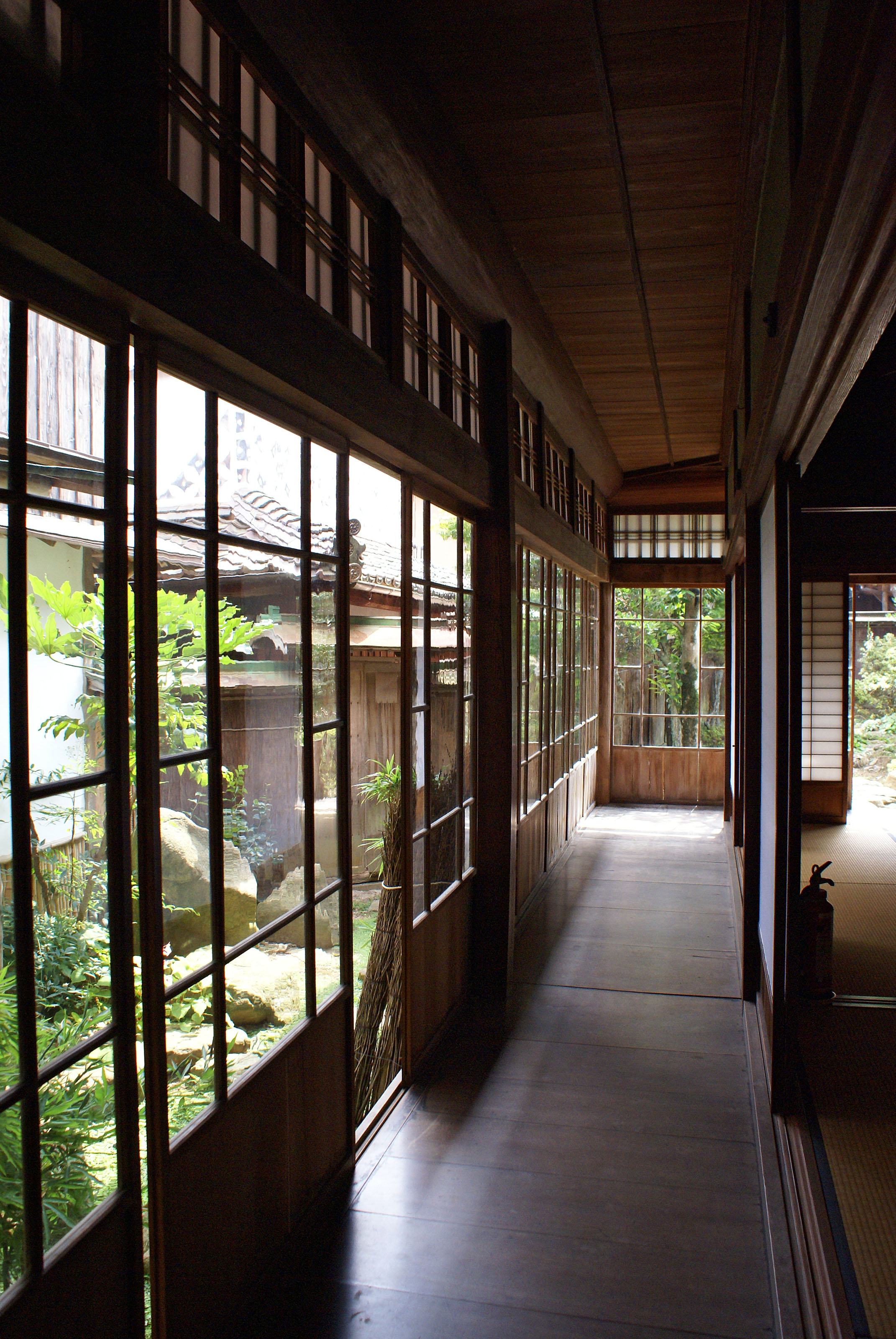 Old Katayama house in Takahashi, Okayama, Japan